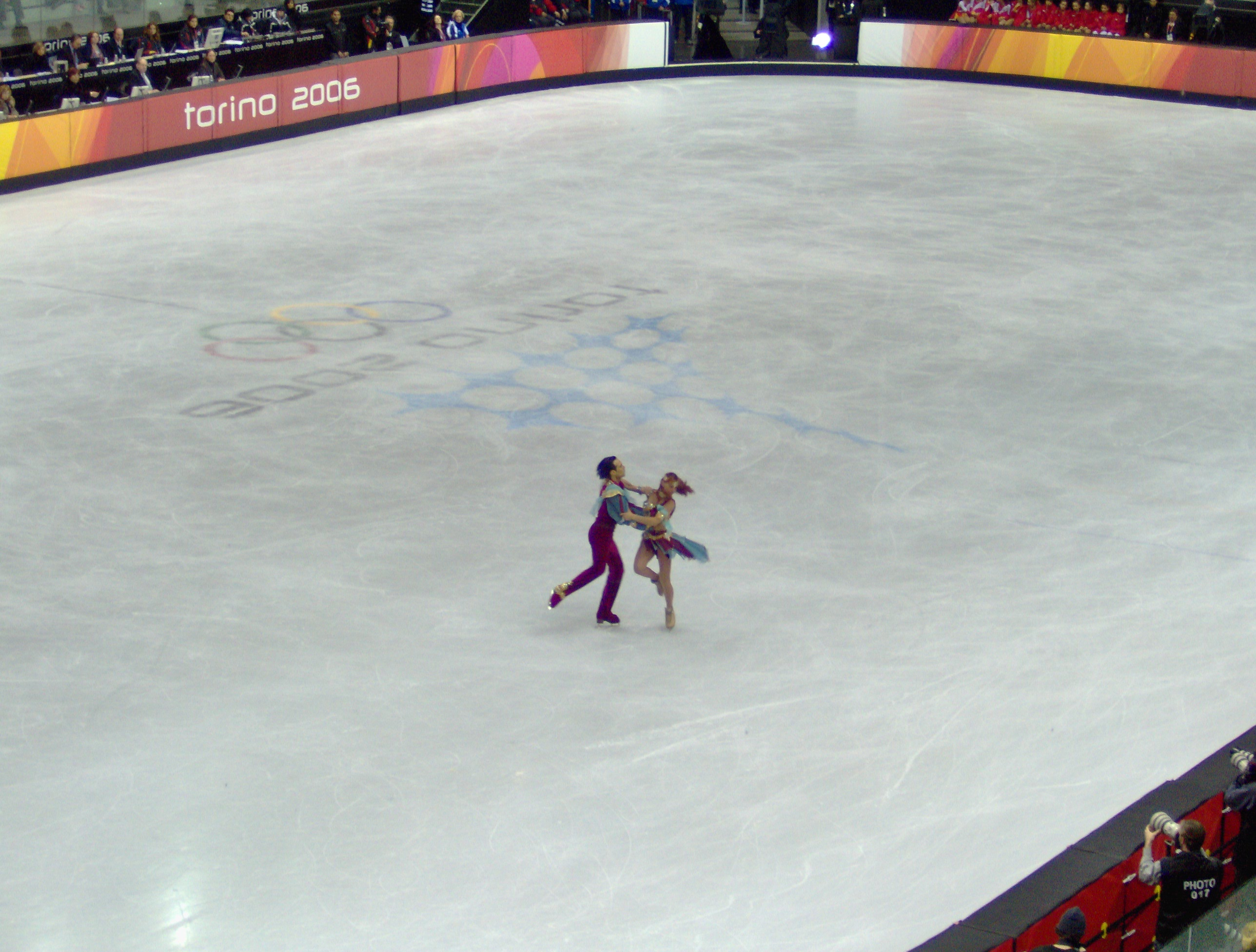 Barbara Fusar Poli e Muaurizio Margaglio, Ice Skating at Palavela Stadium, Barbara Fusar Poli and Maurizio Margaglio of Italy